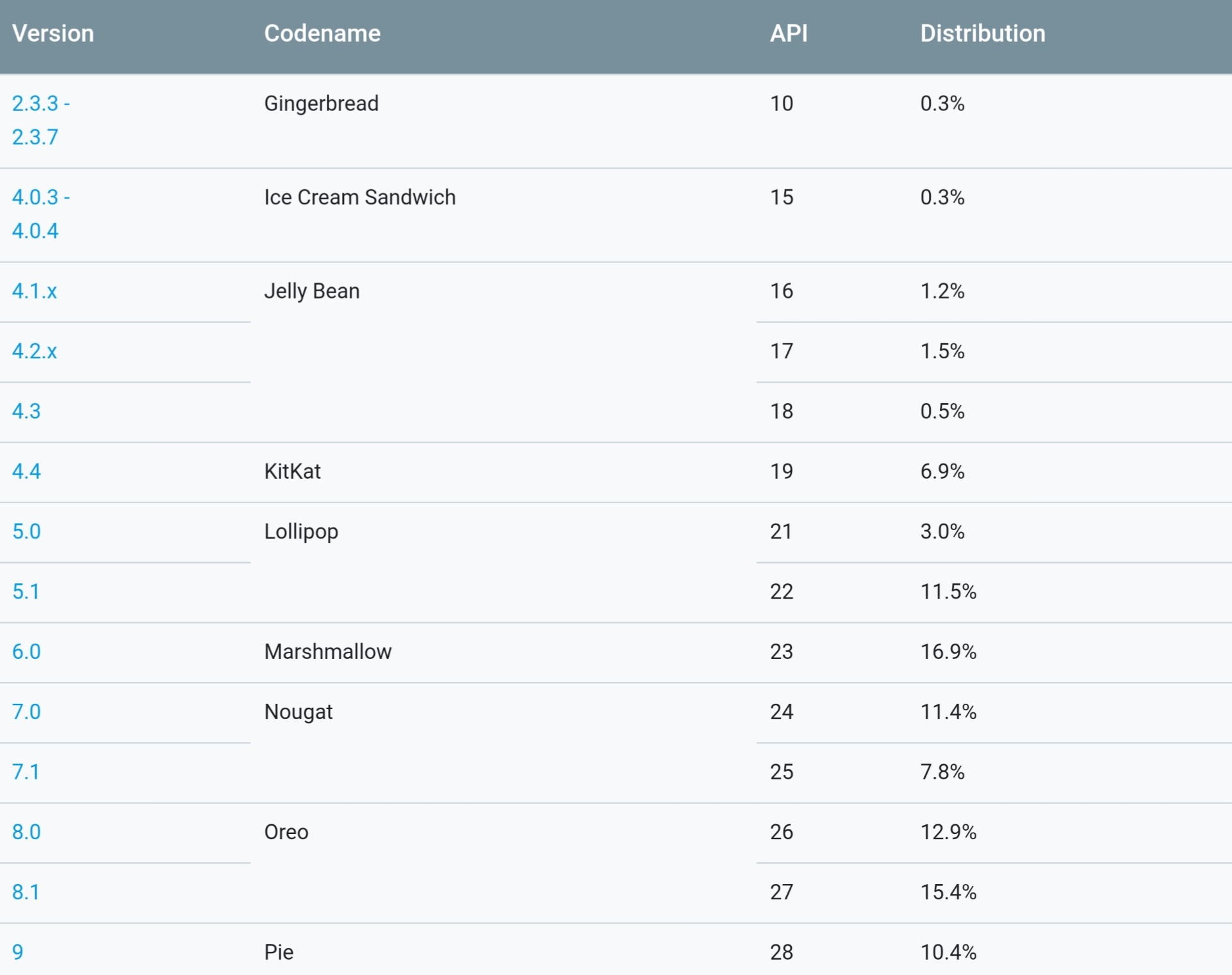 2019.05.07까지_수집된_안드로이드_점유율